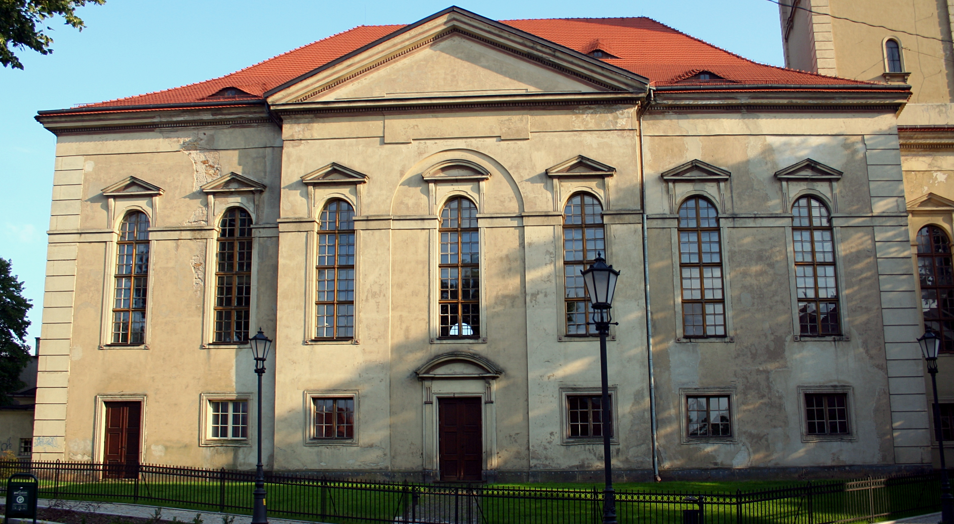 Kościół ewangelicki w Wałbrzychu